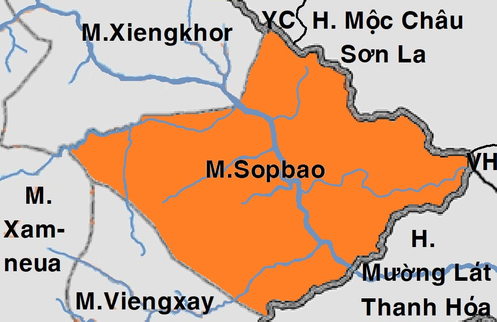 Bản đồ huyện Sop Bao tỉnh Houa Phanh, Lào.